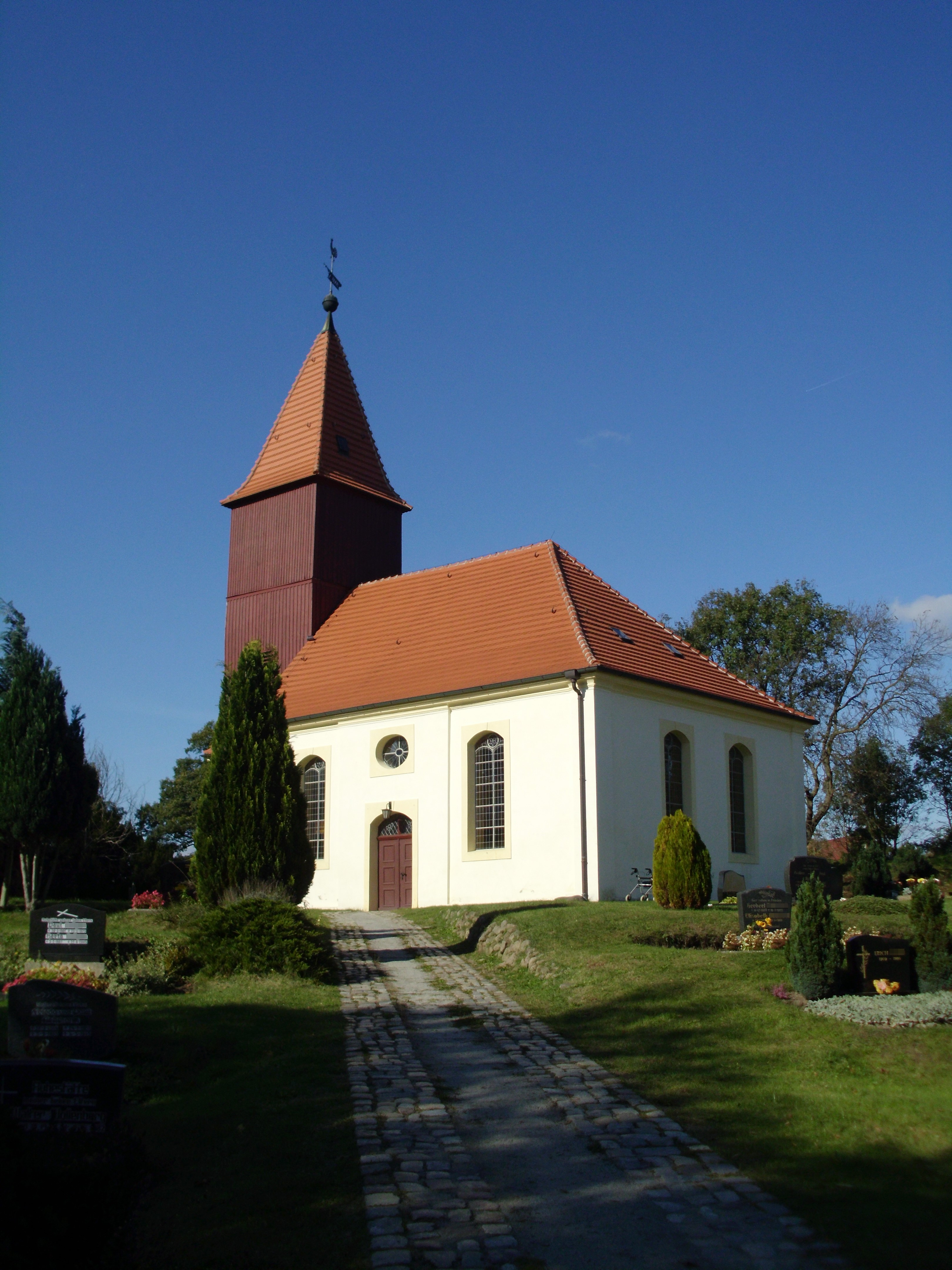 Kirche in Buckow, bei Rietz-Neuendorf, Brandenburg, Germany